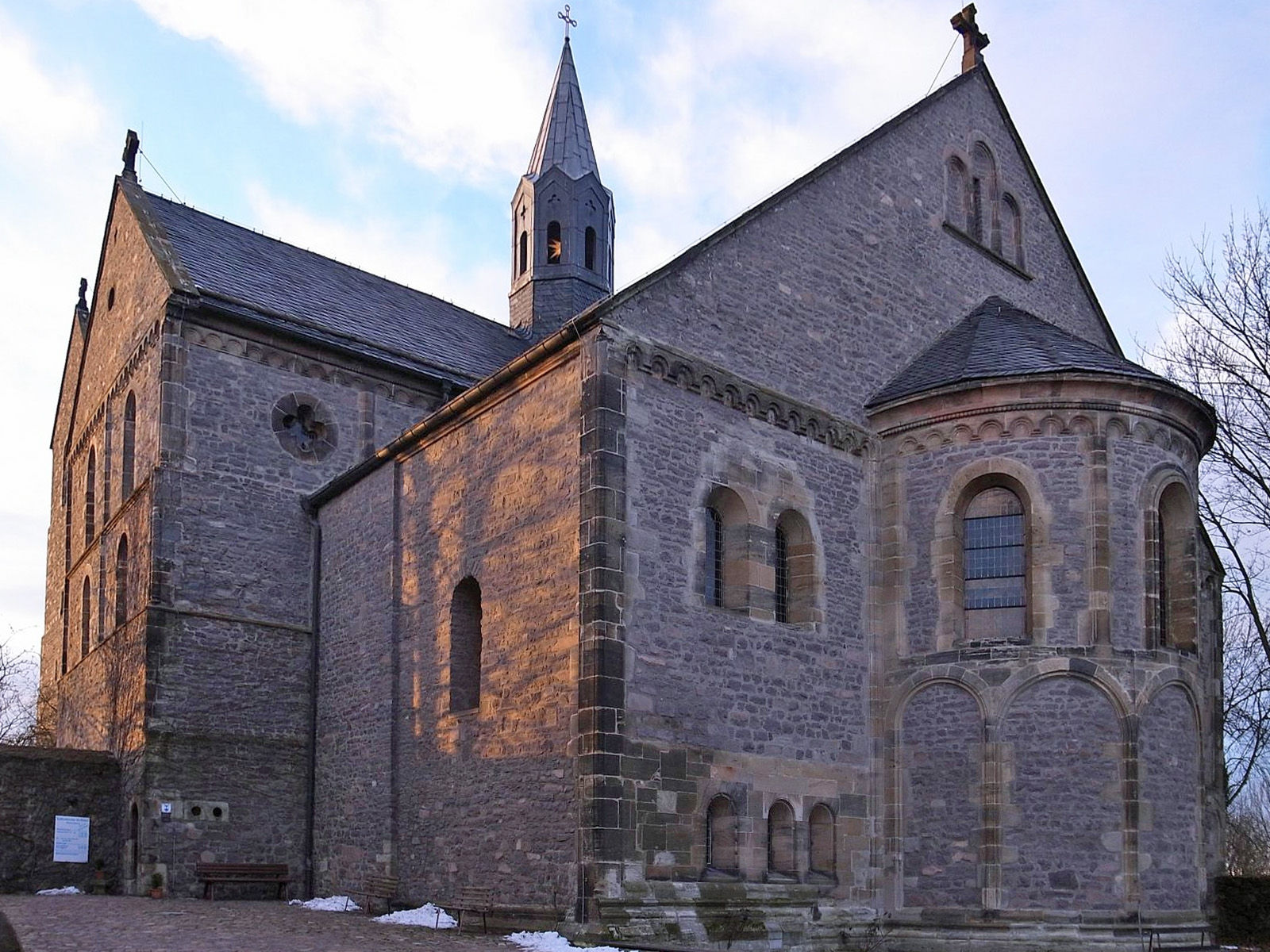 Petersberg (bei Halle) Stiftskirche St. Petrus